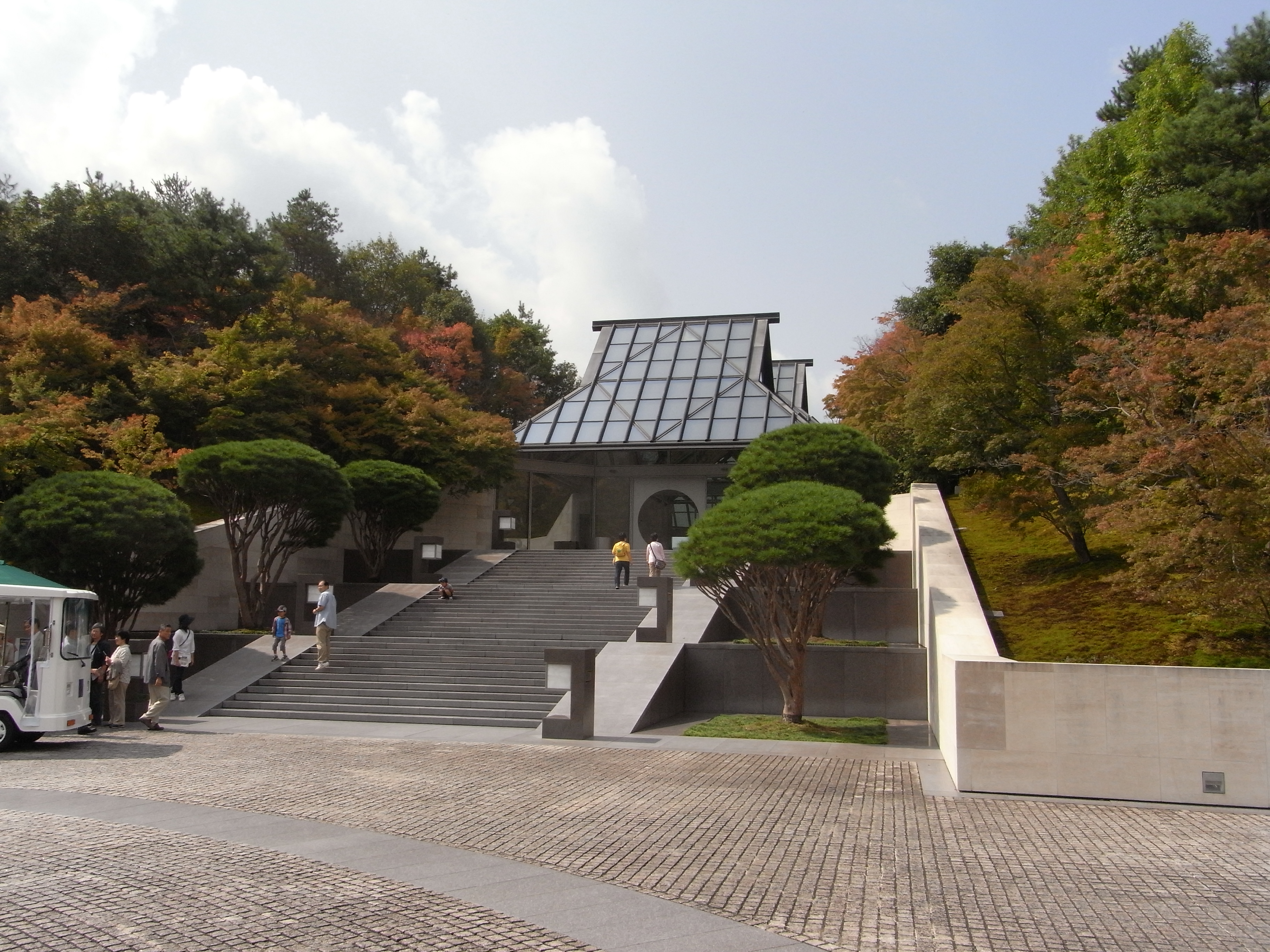 Miho Museum 外観